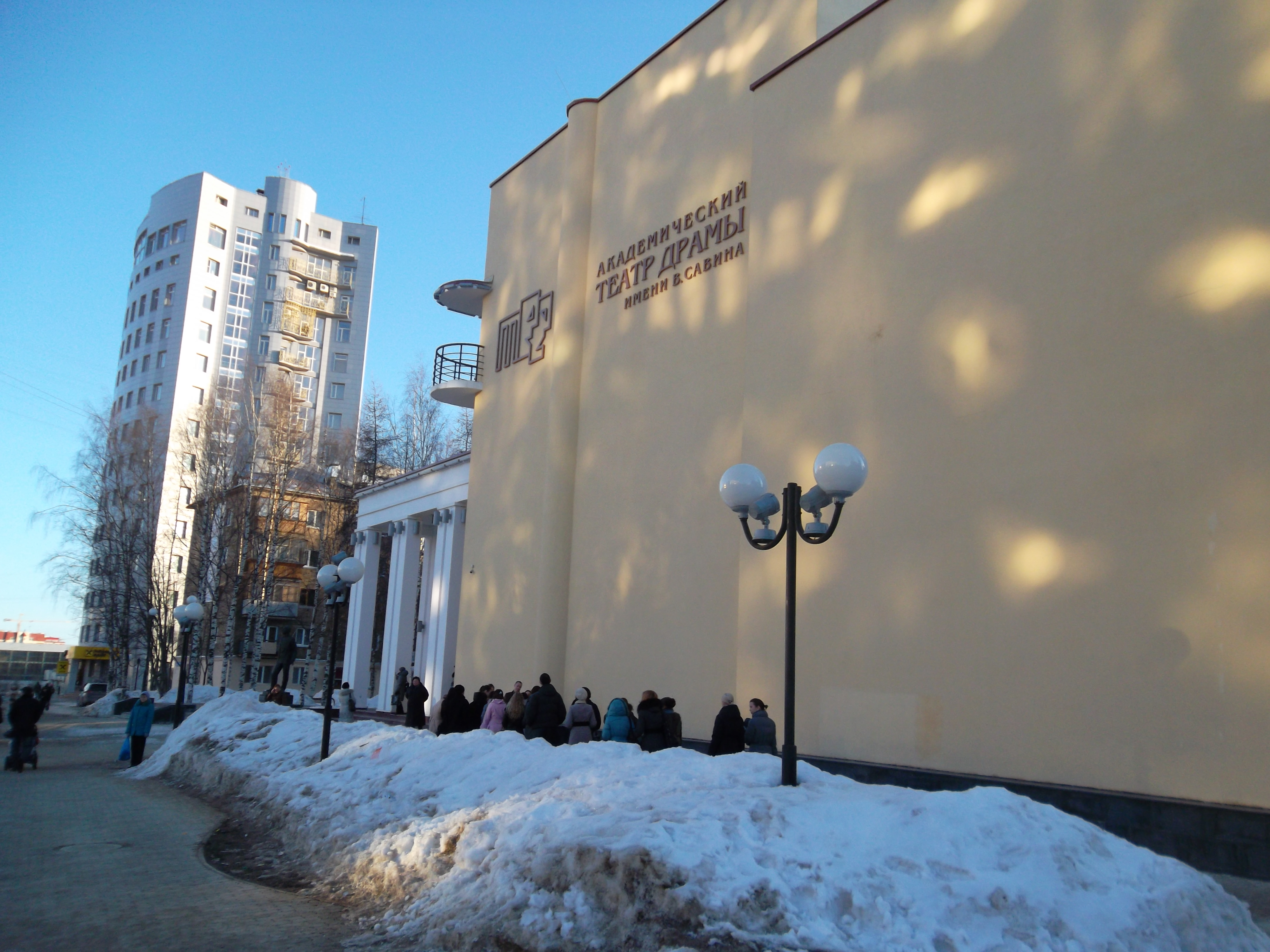 Академический театр драмы им. Савина.